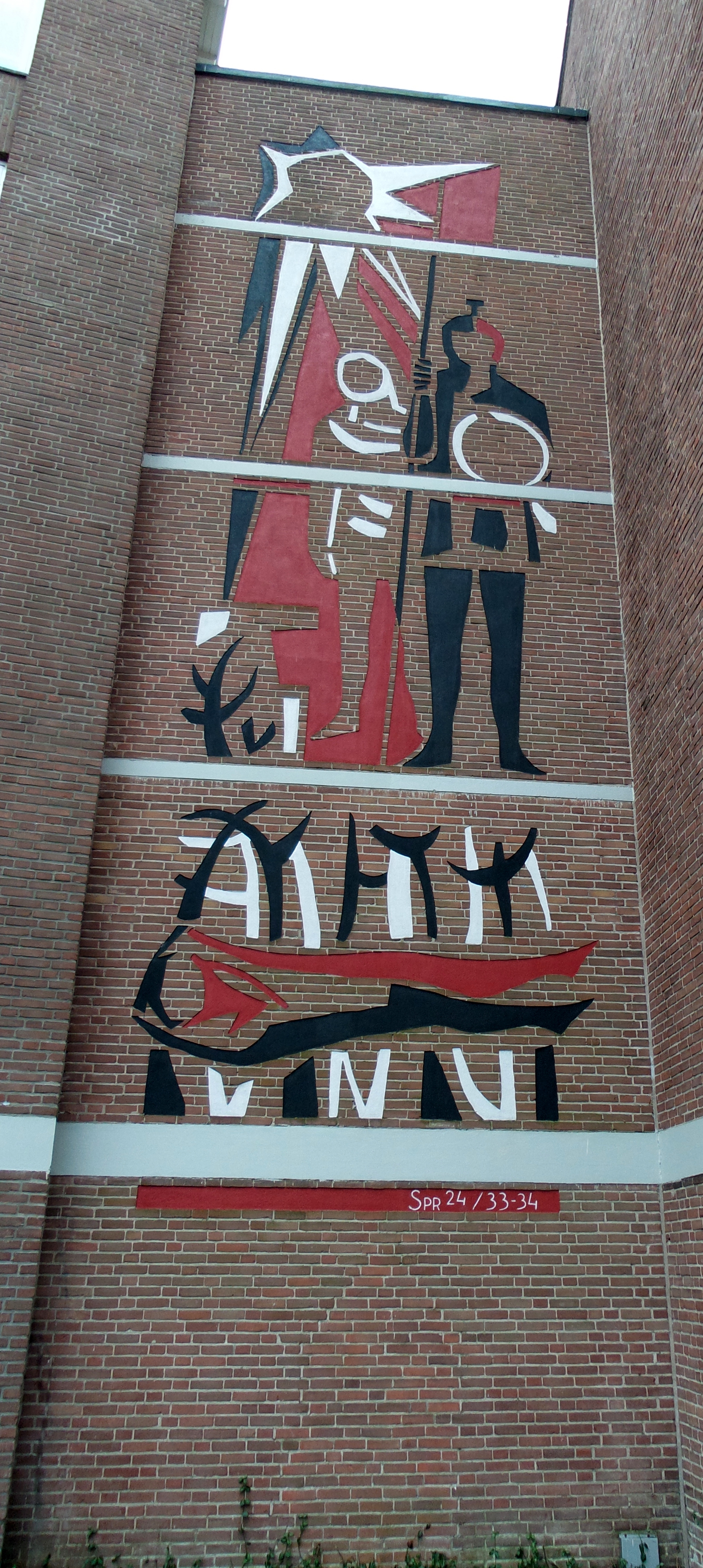 Krijger van Dirk Zwier gevel van flats Blomwijckerpad / Cromme Camp Amsterdam Osdorp uit 1960